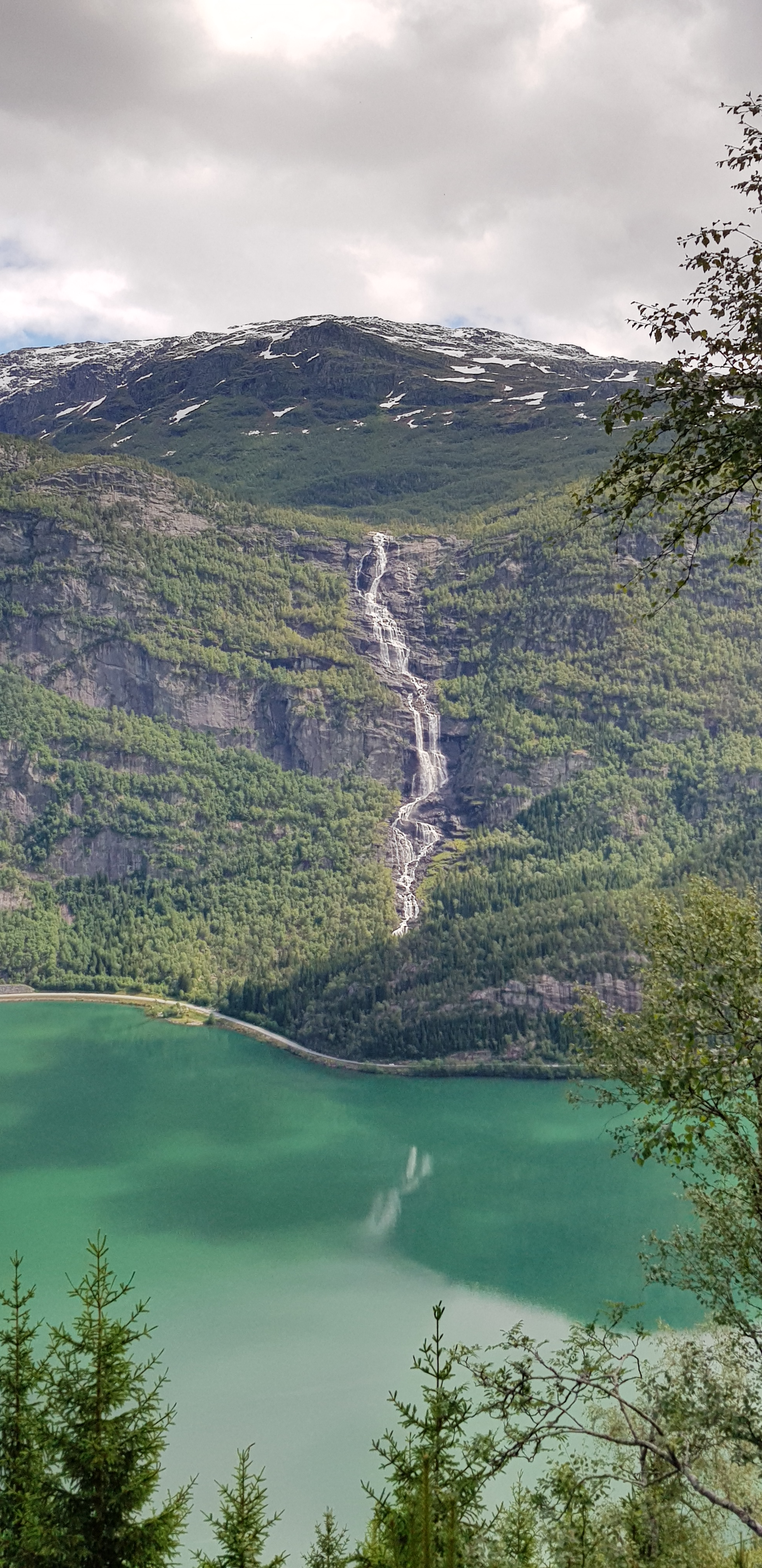 Tjørnadalsfossen (Foto: Joar Øygard).